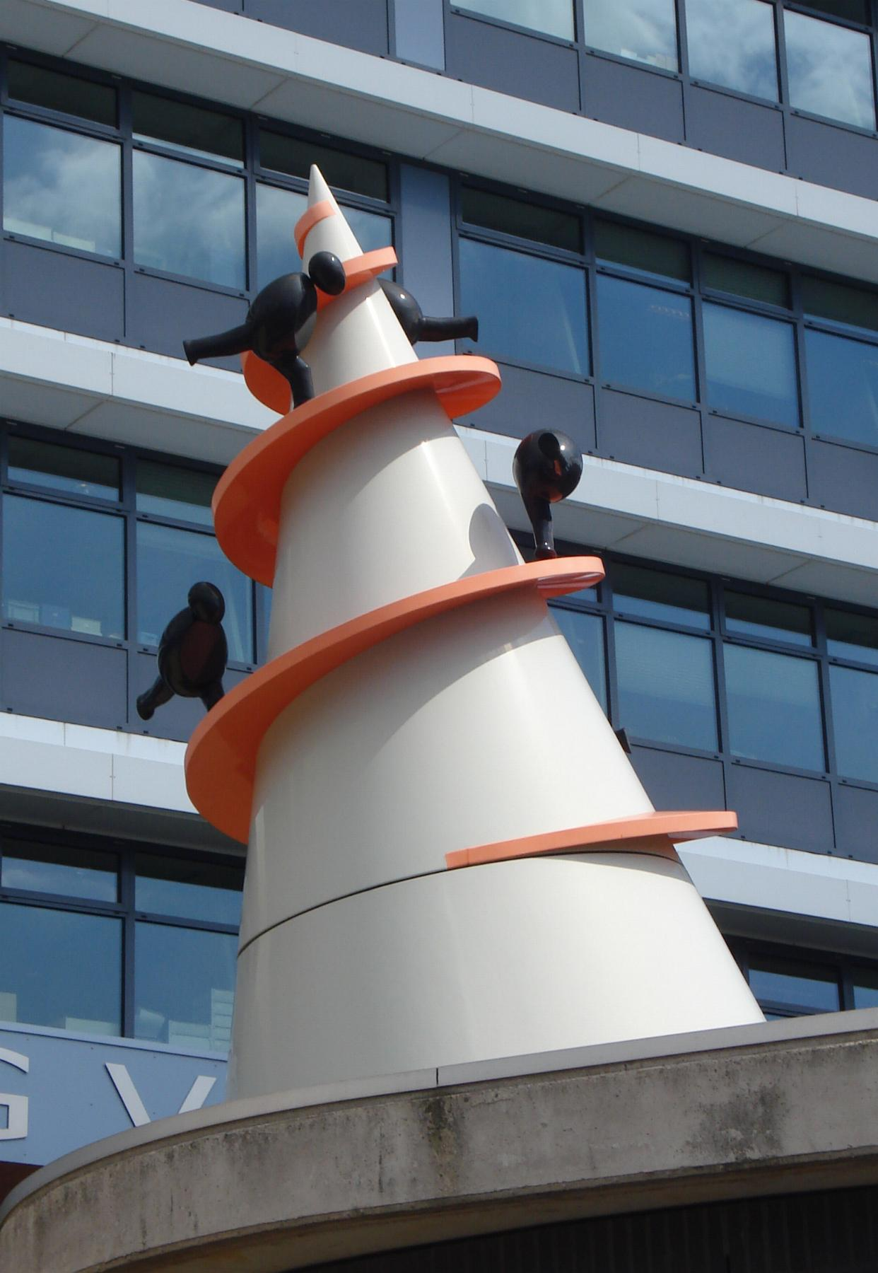 Rijswijk, Bogaardplein. Kunstwerk "States of humanity" van Alex Vermeulen. The Netherlands. FOP.